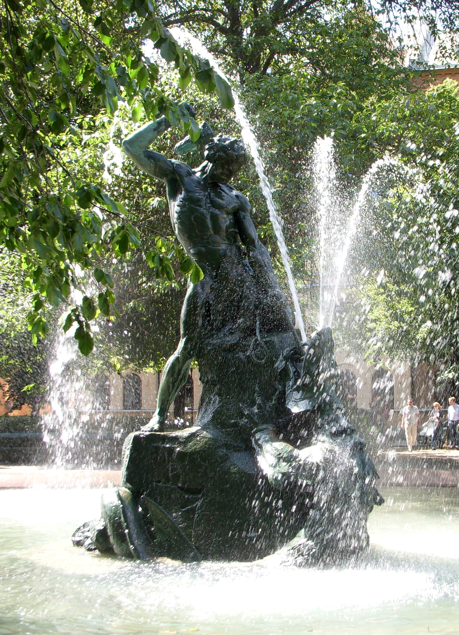 Fontängruppen "Tors fiske" på Mariatorget i Stockholm